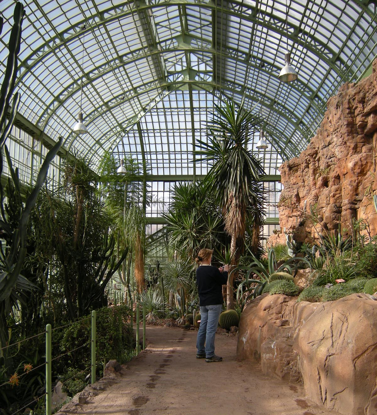 Sundial House (Schönbrunn), now Wüstenhaus. Main hall.